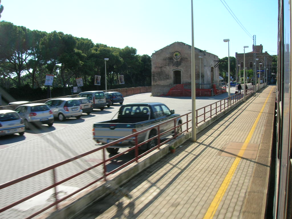 La stazione di Castiglioncello